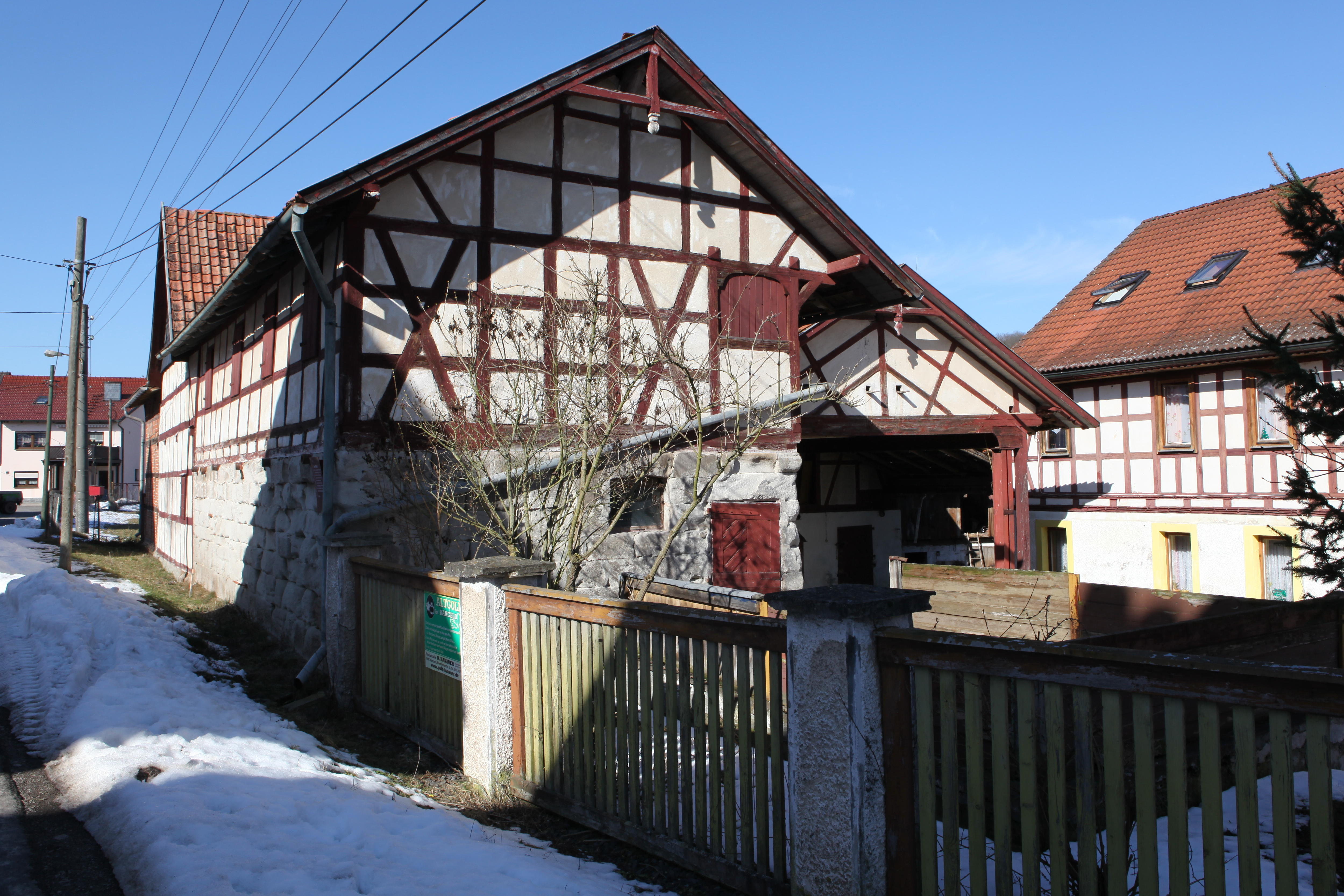 Alte Mühle in Völkershausen, OT von Bad Colberg-Heldburg, Landkreis Hildburghausen